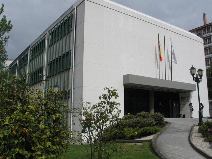 Fachada de la Biblioteca Nodal de Lugo